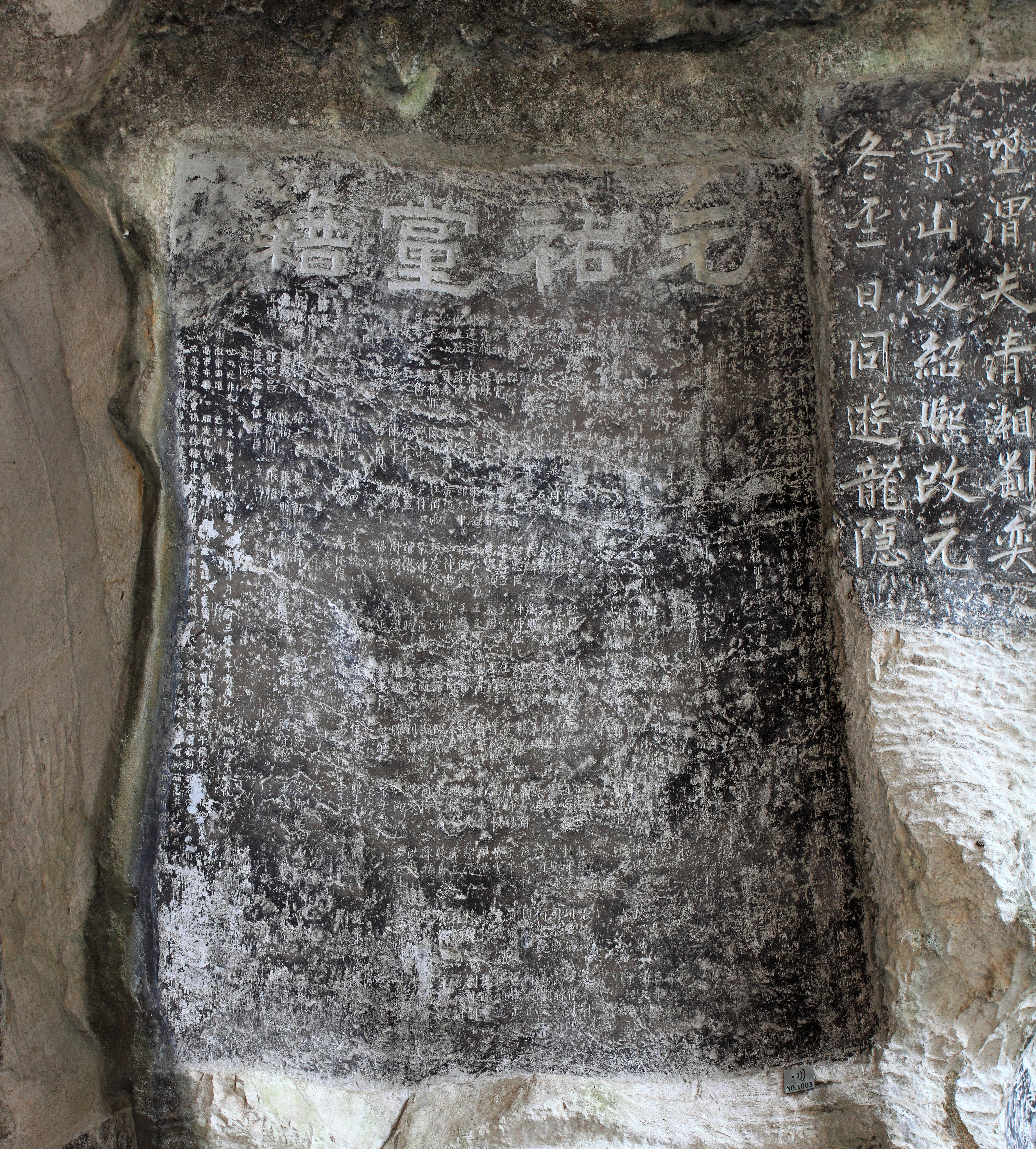 龙隐岩龙隐洞摩崖石刻 宋《元祐党籍》